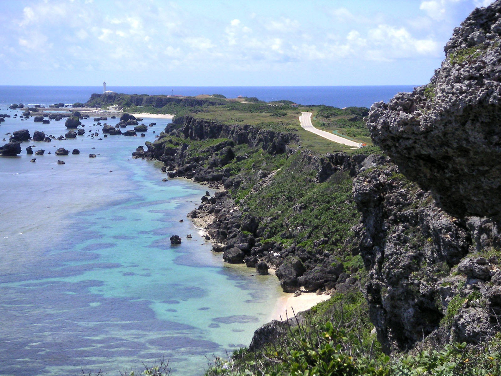 Higashi-Hen'nazaki, Miyako island, Japan / 東平安名崎（宮古島）